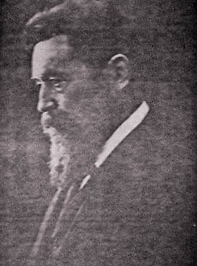 Carl Friedrich Jäger (1794-1842), Pfarrer in Bürg 1816-41 und zuletzt in Münchingen, Verfasser zahlreicher Werke zur Regionalgeschichte im schwäbisch-fränkischen Raum